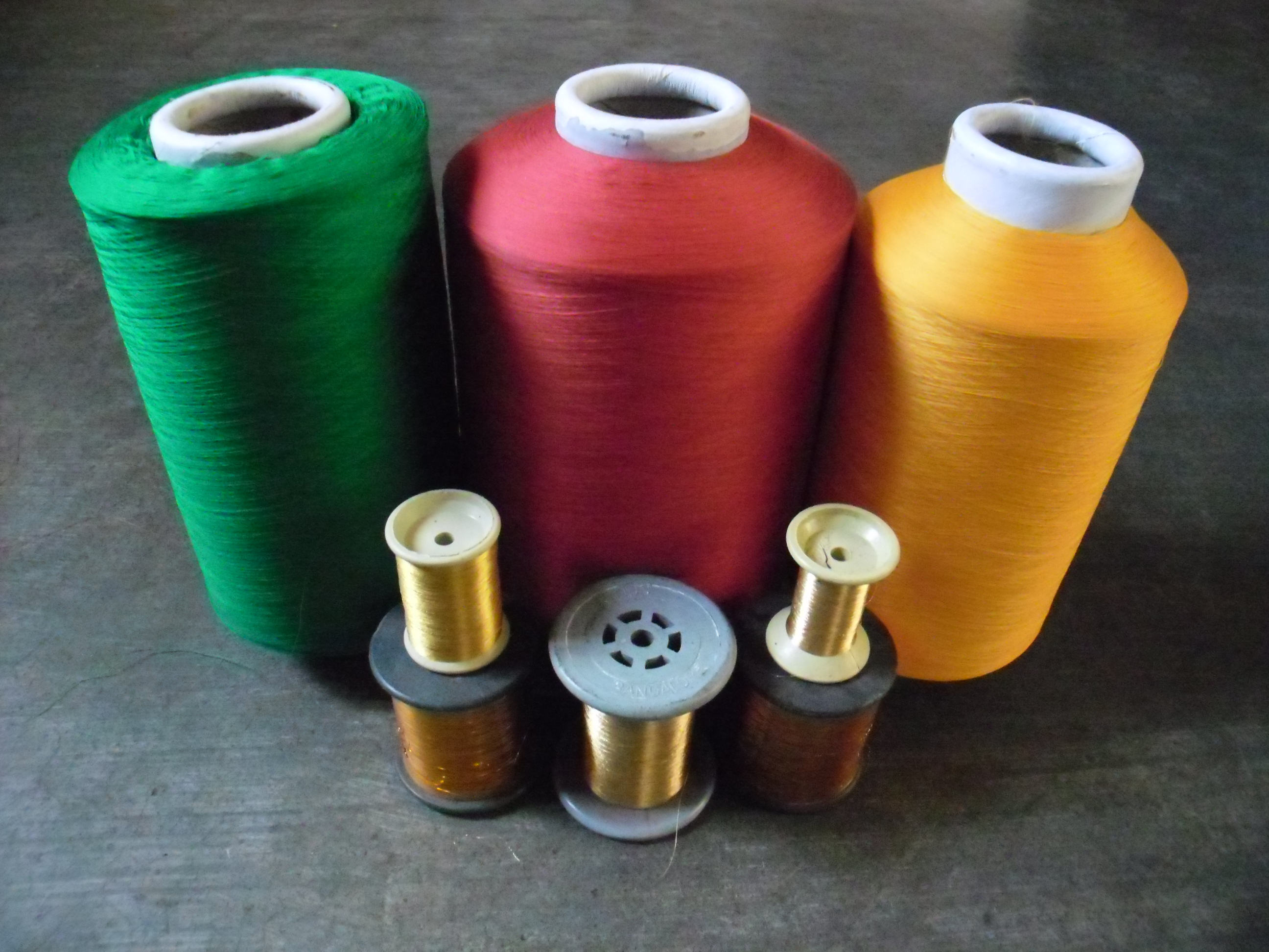 பாலிஎஸ்டர் நூற்கண்டுகளும் ஜரிகைக் கண்டுகளும்